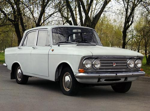 Автомобиль Москвич-408